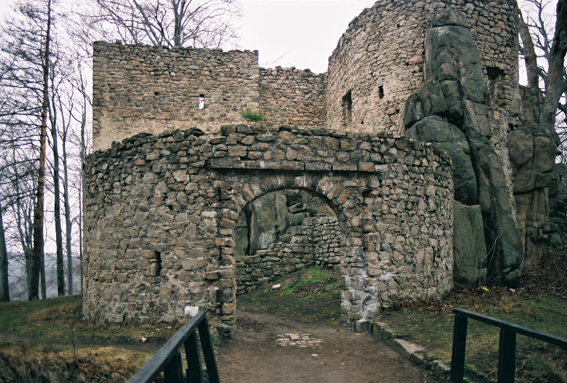 Ruins of Castle Bolczów in Rudawy Janowickie, Sudety, Poland